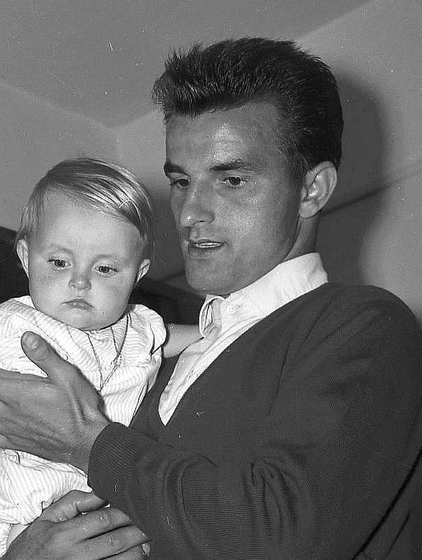 domicile de Lucien Muller. Août 1959. Vue de Lucien Muller et de sa petite famille à son domicile.